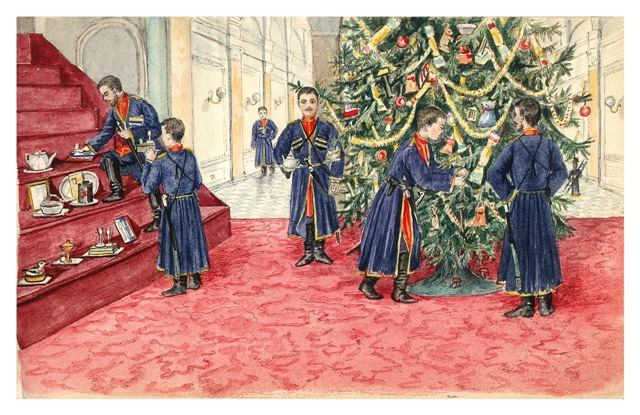 Во времена Александра III на Мраморной лестнице устанавливали рождественскую ель. Как это было - сохранил для нас рисунок великой княжны Ольги Александровны из коллекции О. Н. Куликовской-Романовой.